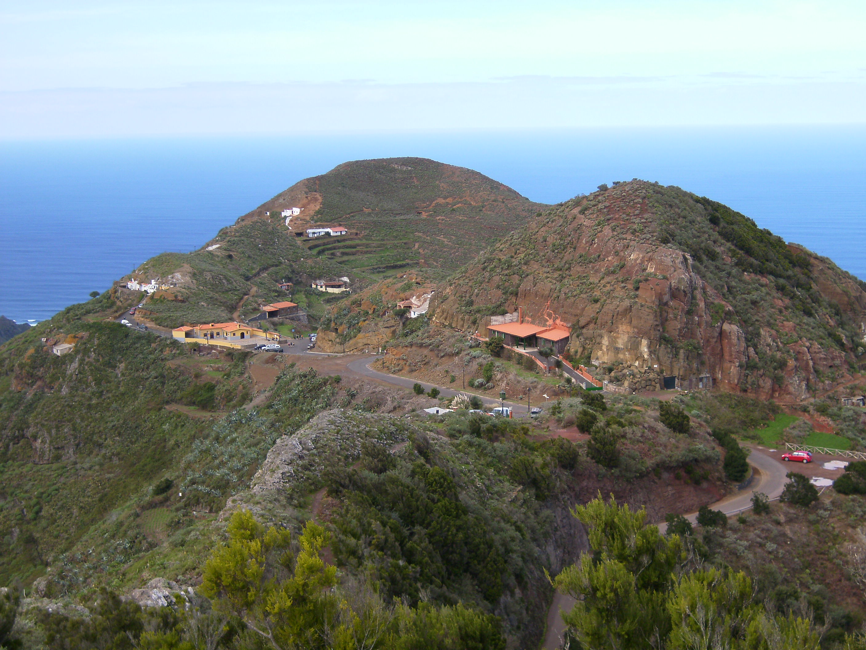 Vista general del caserío de Chinamada, en Anaga (Tenerife)